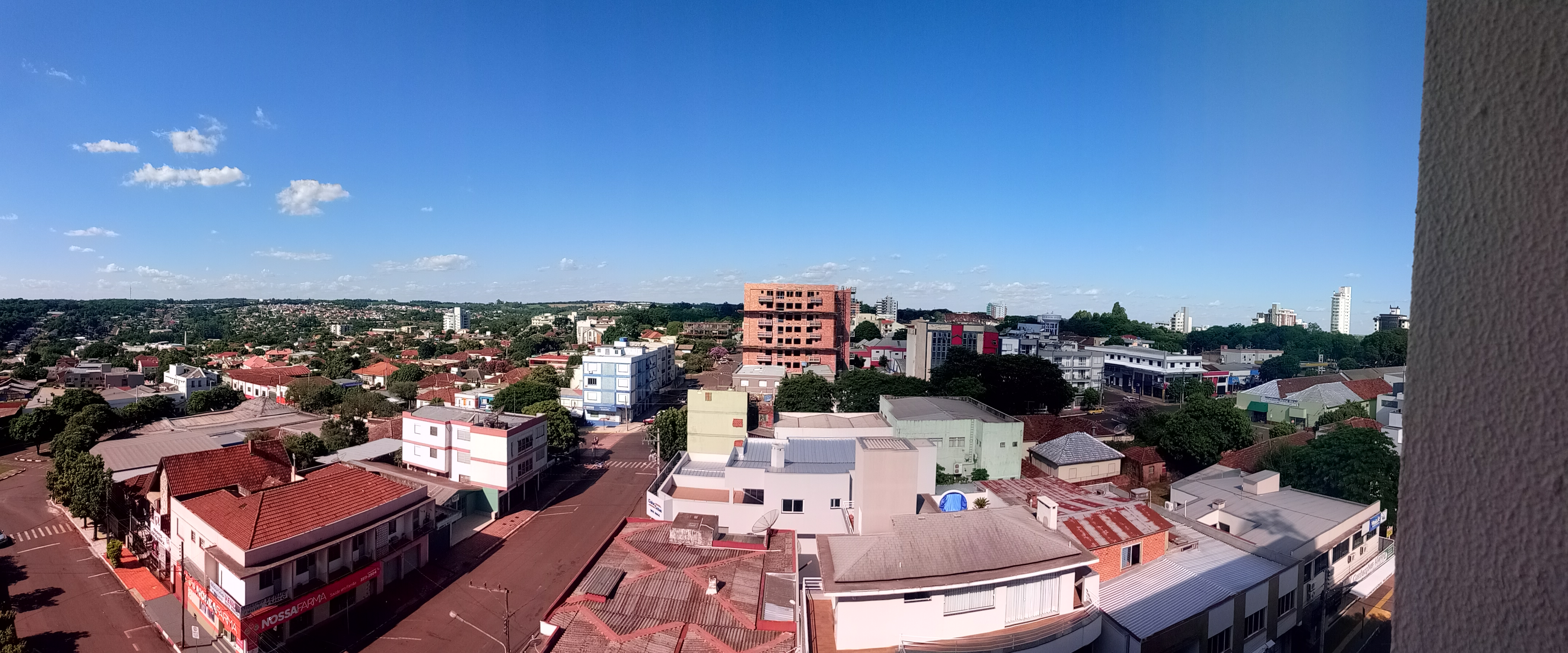 Vista panorámica de la ciudad de Santa Rosa, Río Grande do Sul, Brasil, desde el 7° piso del hotel Rigo.